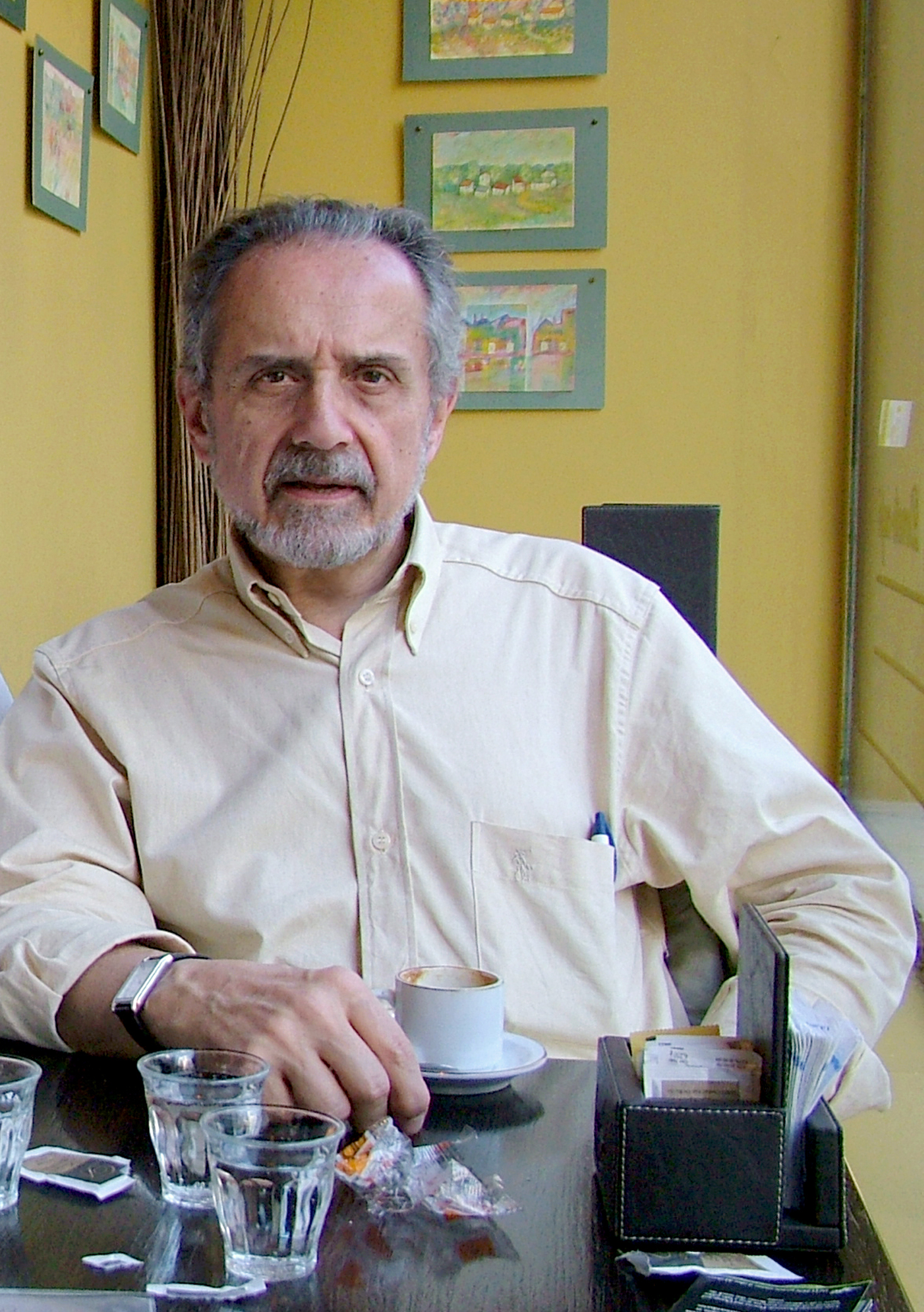 Oscar Steimberg